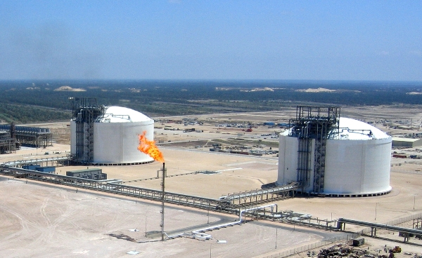 إساله الغاز الطبيعي في ادكو